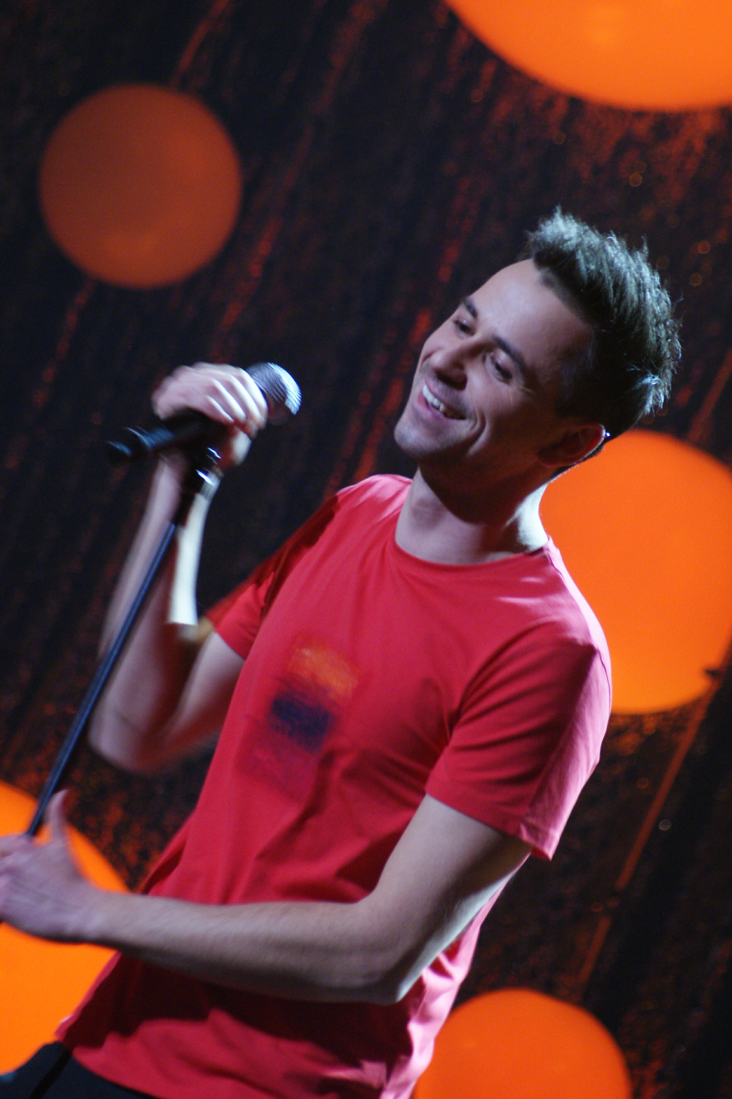 Marek Karwowski podczas koncertu Krajowych Eliminacji Eurowizja 2011